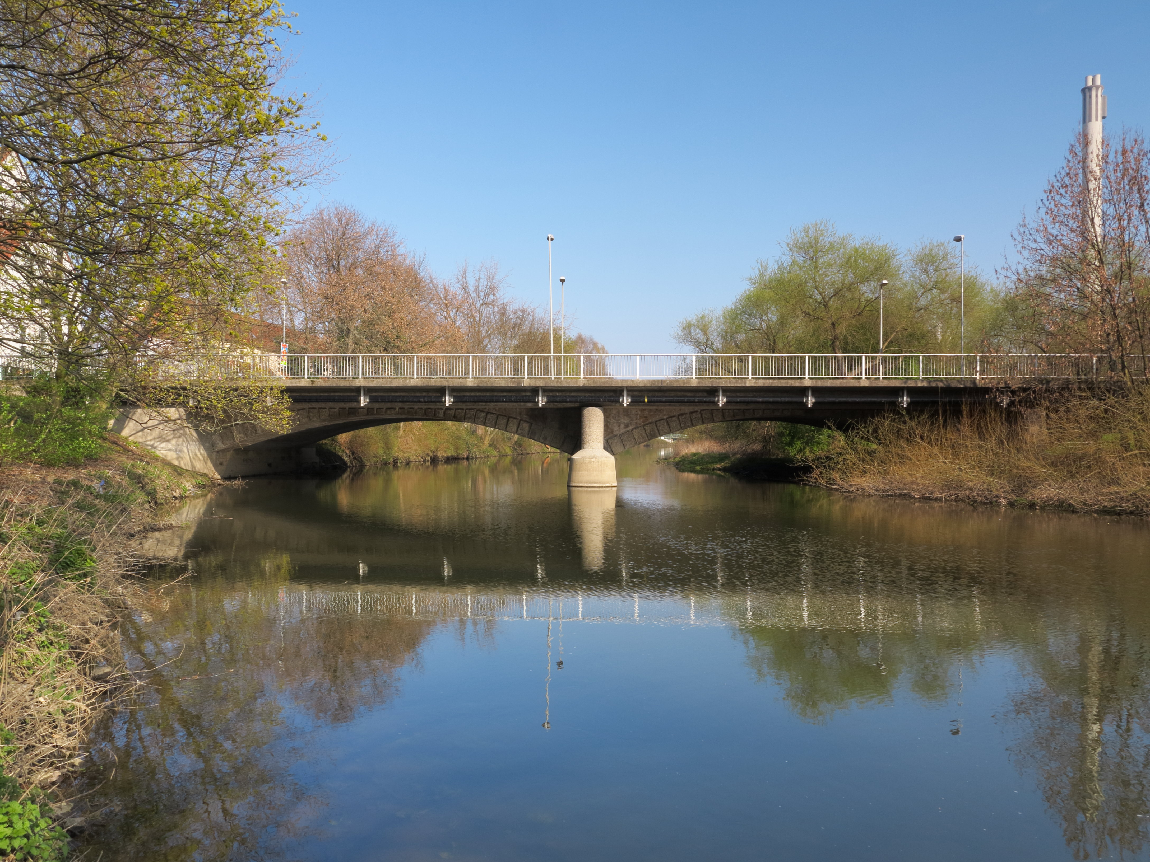 Die Wendenringbrücke in Braunschweig. Sie wurde 1889 nach Plänen des Architekten Ludwig Wintererrichtet und 1967/1968 mit auskragenden Stahlbetonkonstruktionen verbreitert, wodurch ihr Erscheinungsbild stark verändert wurde.